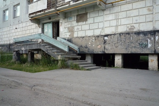 Woonflat in Yakutsk, gebouwd op permafrost (De fundering vindt als volgt plaats: in de bevroren grond worden gaten geboord waarin betonnen palen worden geplaatst, plm 4 meter in de permafrost. Daarboven bevindt zich dan de jaarlijks bevriezende en ontdooiende laag van ongeveer een meter. Pas één tot twee meter boven het maaiveld wordt de fundering van het gebouw gestort op de funderingspalen; anders gezegd: alle gebouwen staan op poten ongeveer twee meter boven de grond, waardoor 's winters de koude lucht vrij spel heeft over de bodem. Dat laatste is nodig om te voorkomen dat de permafrost onder de gebouwen gaat smelten.)